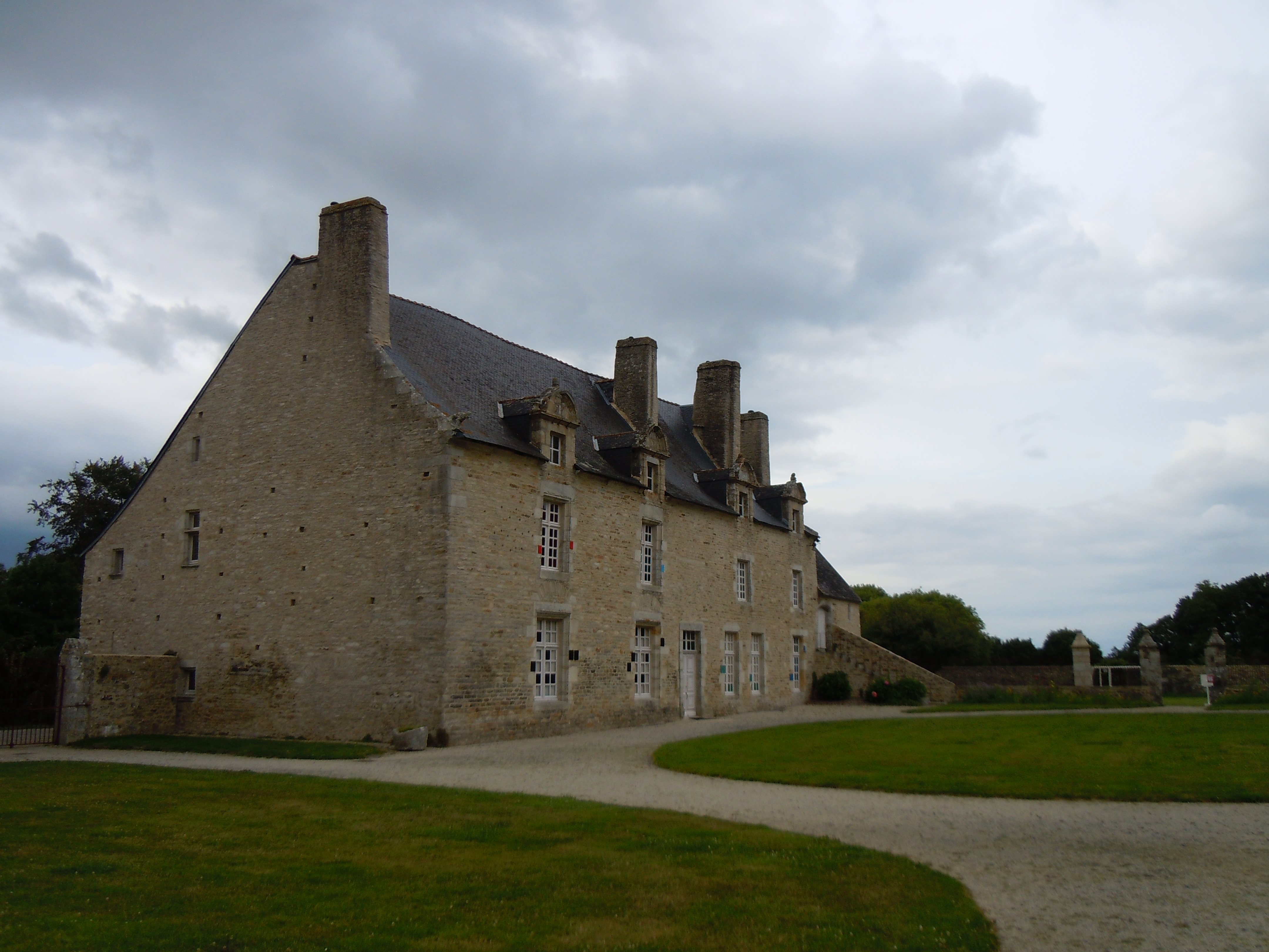 Manoir de Kernault, corps principal, commune de Mellac, département du Finistère, France